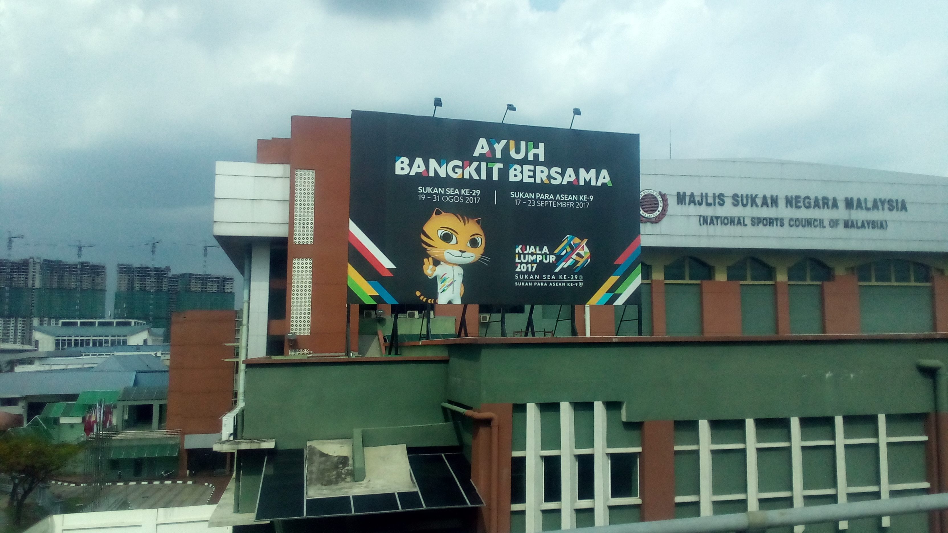 国家体育理事会